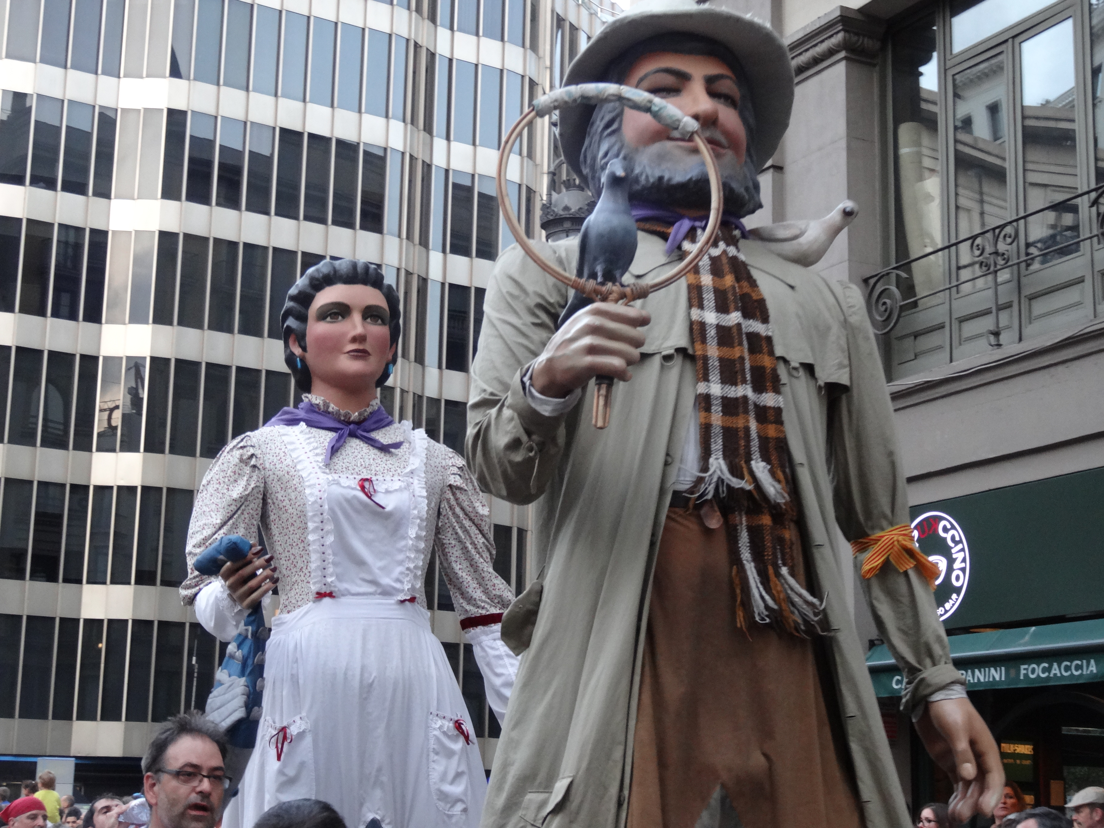 Cercavila de la Mercè 2013 a Barcelona. Gegants de la Sagrada Familia (Pere i Pepa)